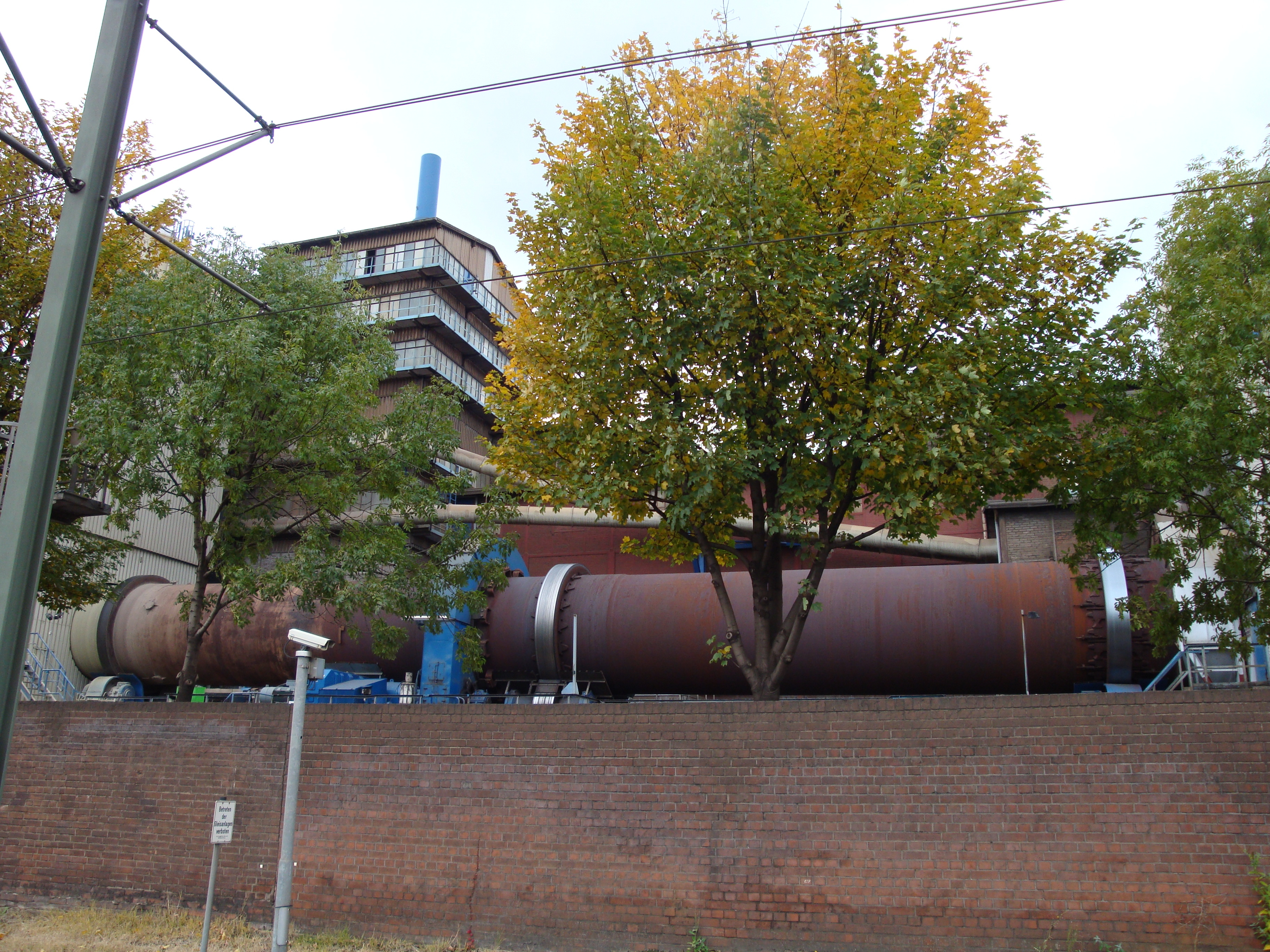 Außenansicht des Wälzofens der Befesa Zinc in Duisburg